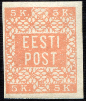 Первая почтовая марка Эстонии, 1918